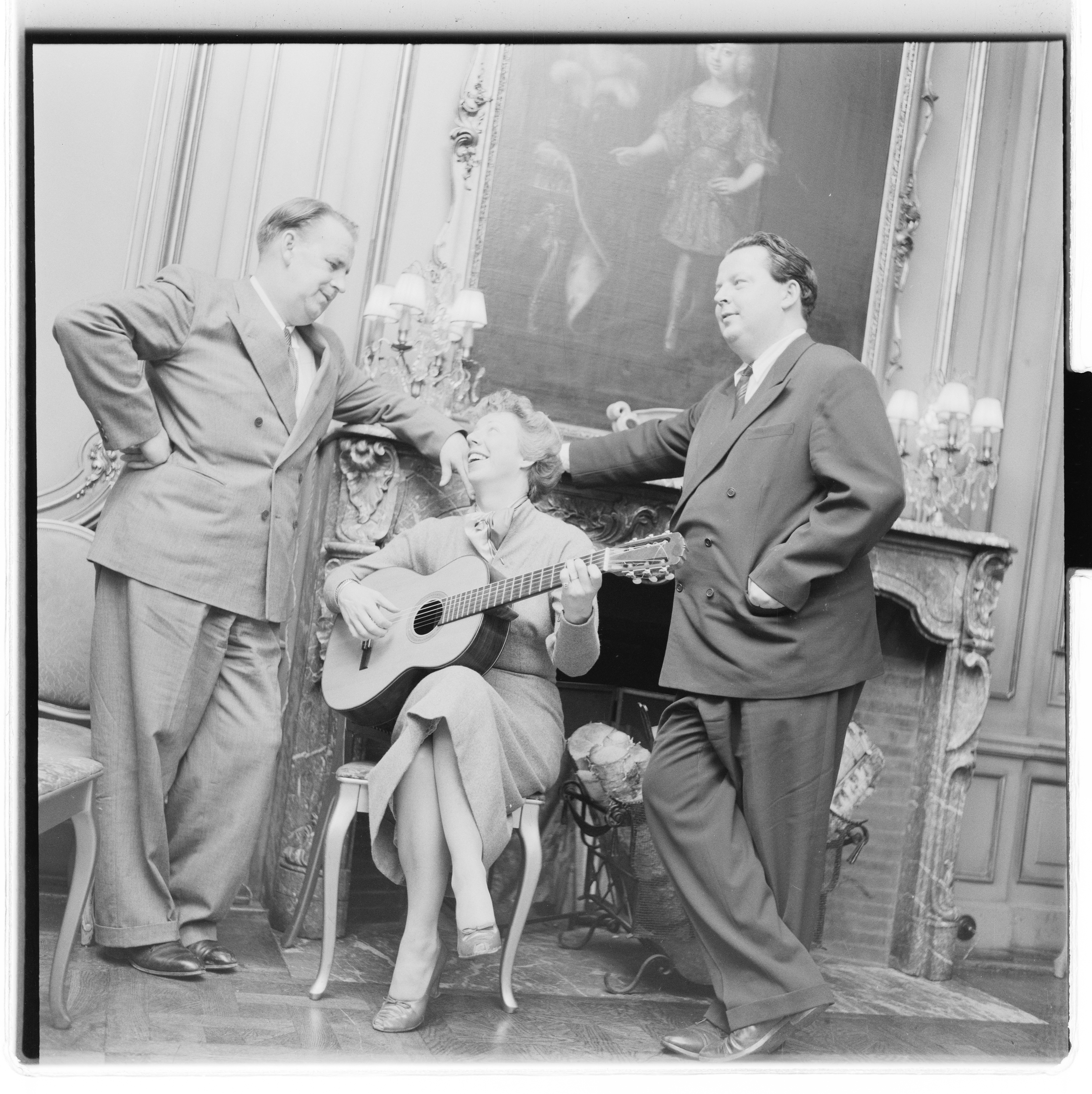 Bildet er hentet fra Arkivverket. Vise-sangere. NÅ nr. 24,1953 Arkivinstitusjon : Riksarkivet Arkivnavn : Billedbladet NÅ Sted : Norge, Ukjent, Ukjent, Ukjebt Avbildet: Prøysen, Alf;Olrog, Ulf Petter